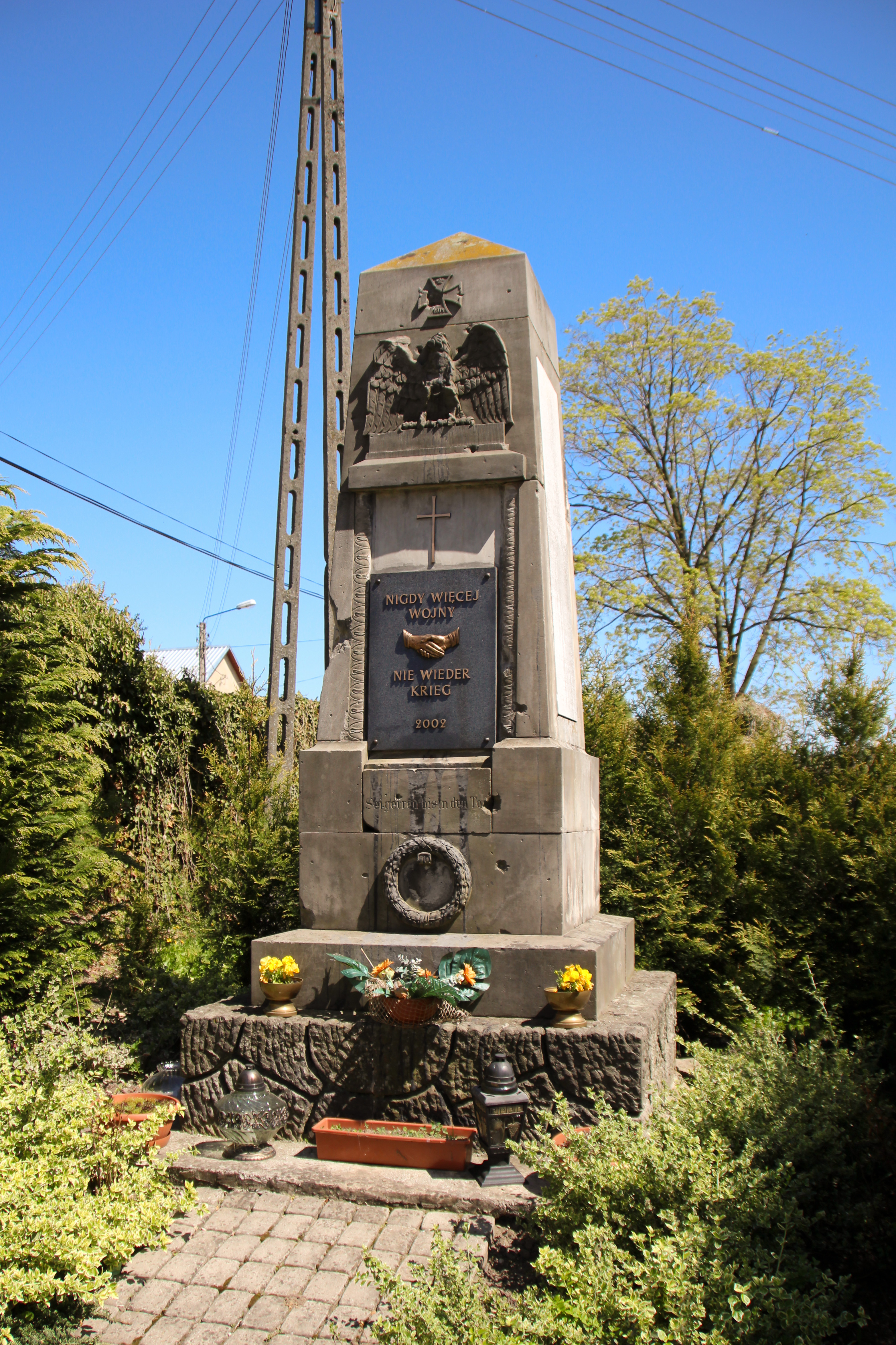 Pomnik poległych w I wojnie światowej w Rozumicach. Napis: "Nigdy więcej wojny - Nie wieder Krieg - 2002"